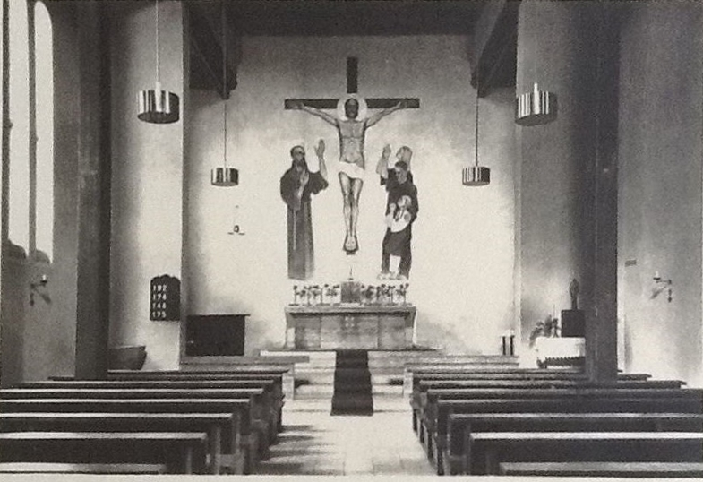 Berlin-Friedrichshagen, St. Franziskus-Kapelle um 1970